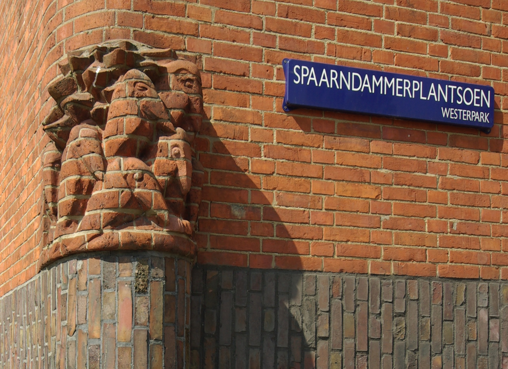 Gebouw Het Schip in Amsterdam 8″ N, 4° 52′ 27.06″ E